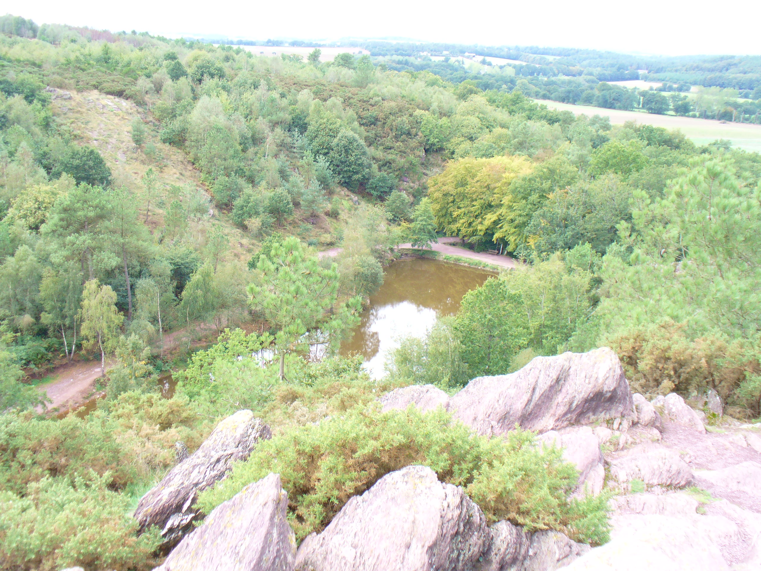 Vu du dessous du Val sans Retour. Photo prise par Axel Ronvaux.